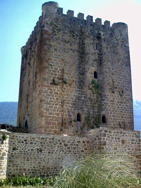 Castillo de los Velasco (Lezana de Mena, Burgos).